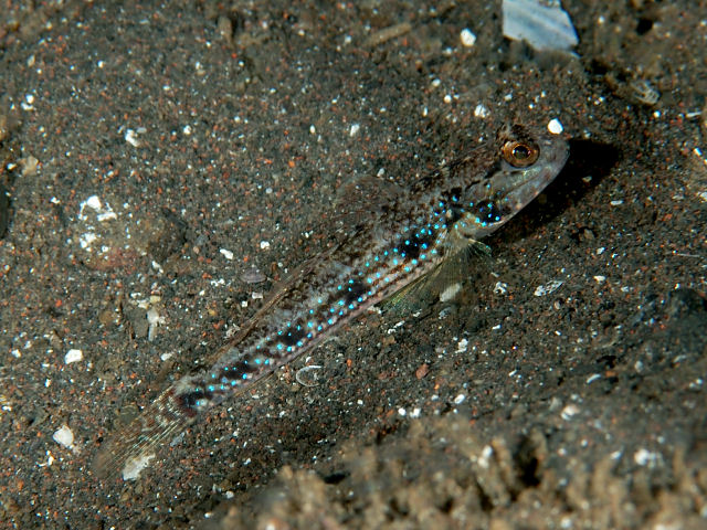 スジハゼ Acentrogobius pflaumii